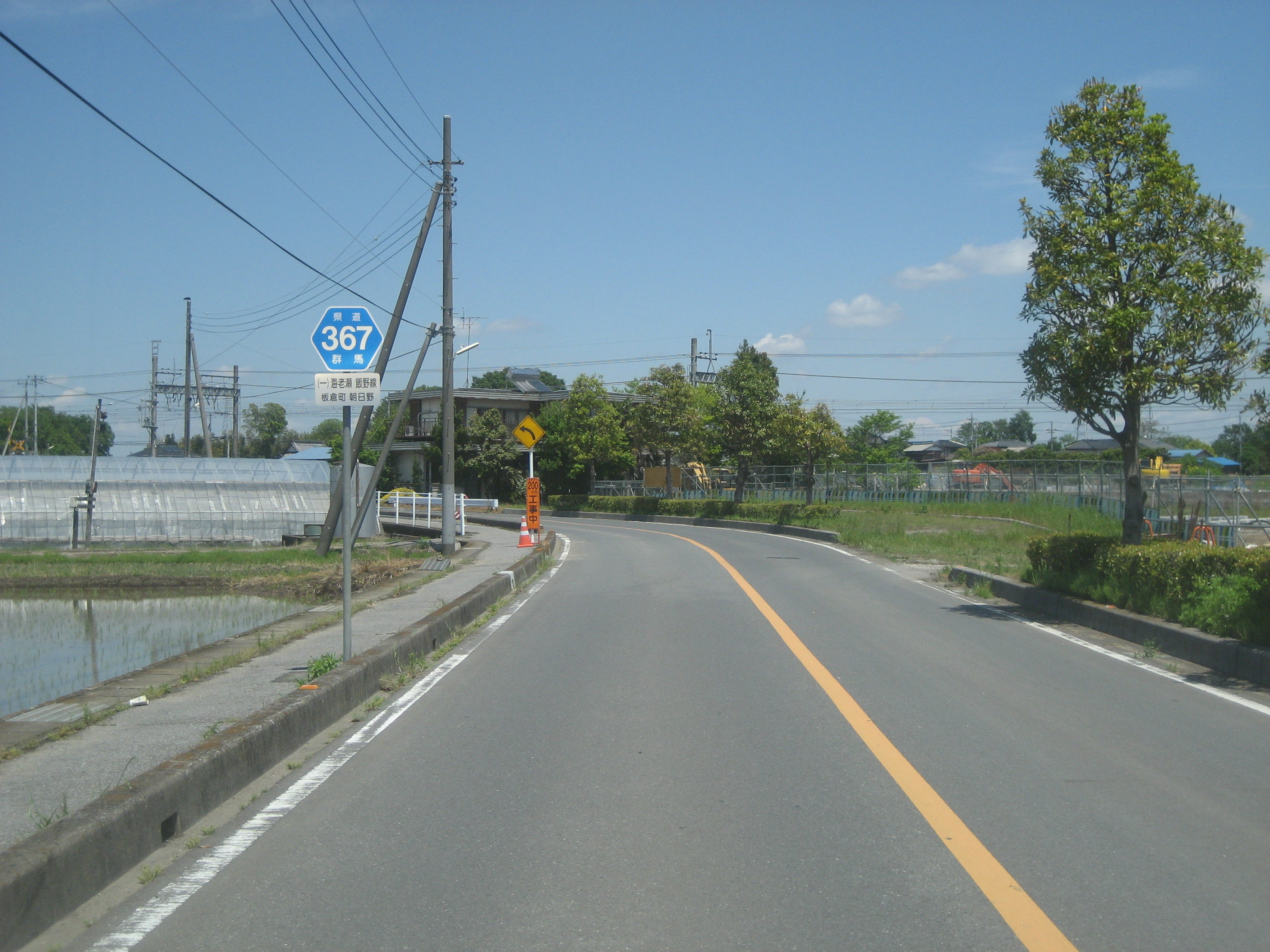 群馬県道367号線板倉町朝日野付近